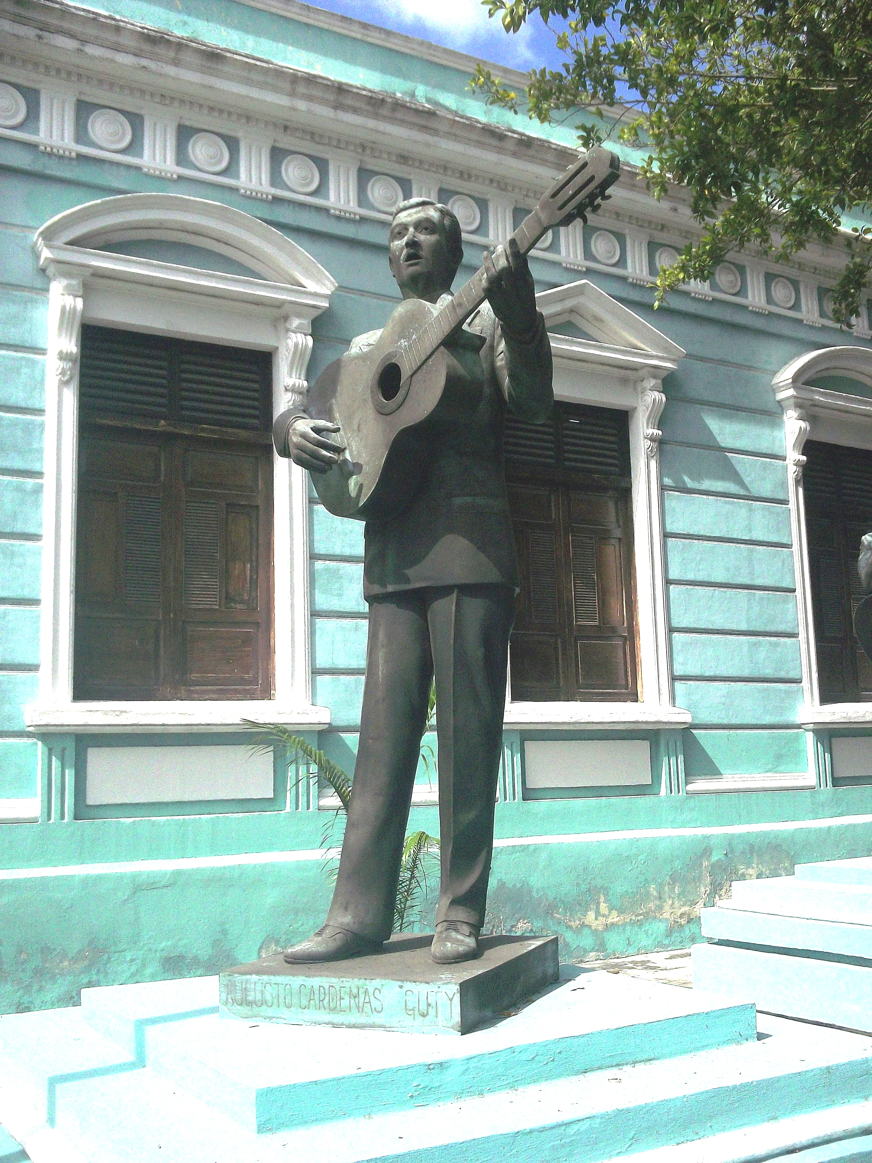 Estatua de Guty Cárdenas en Mérida, Yucatán